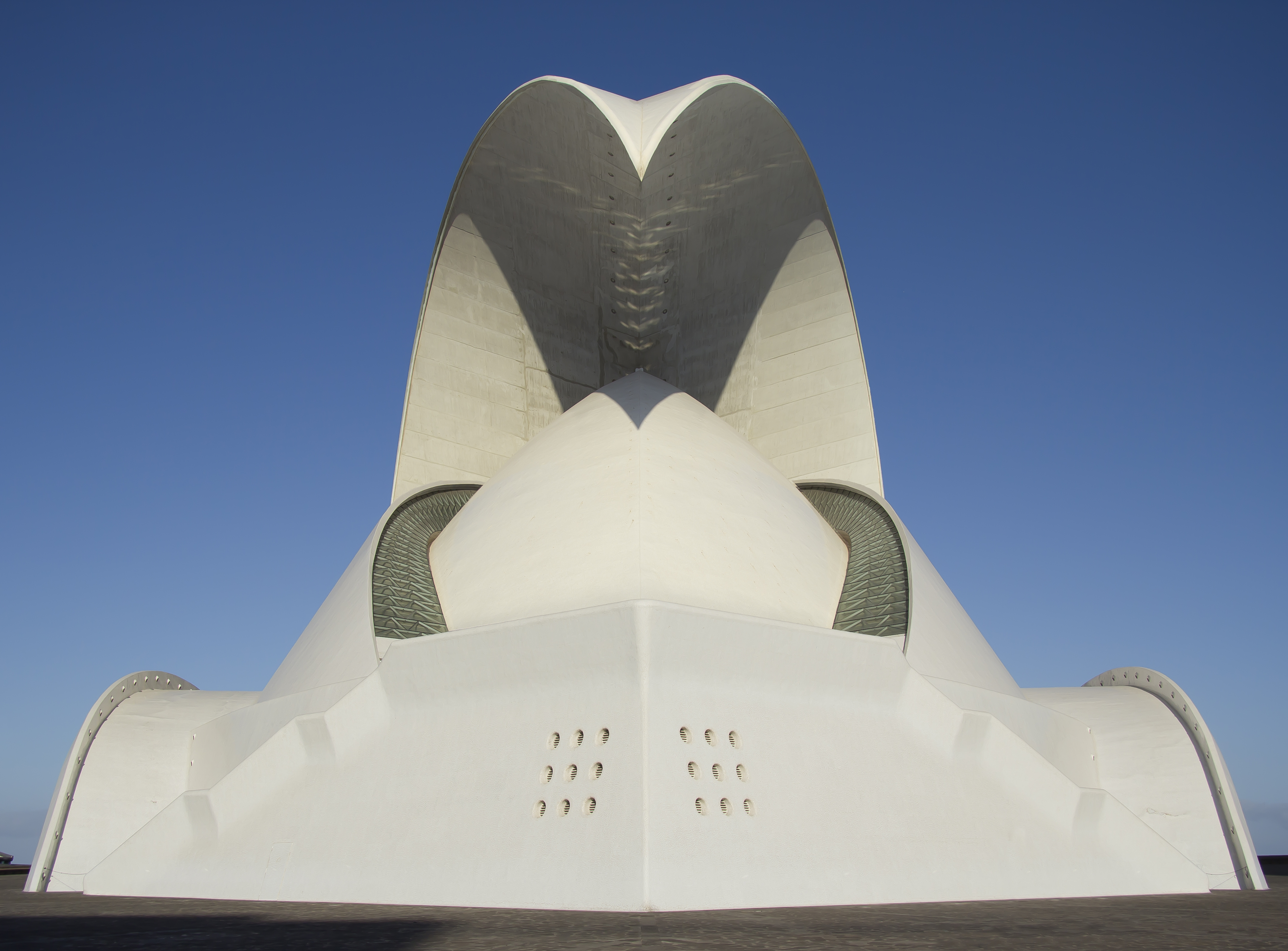 Auditorio de Tenerife „Adán Martín“ in Santa Cruz de Tenerife, Blick von Westen mit Licht von hinten